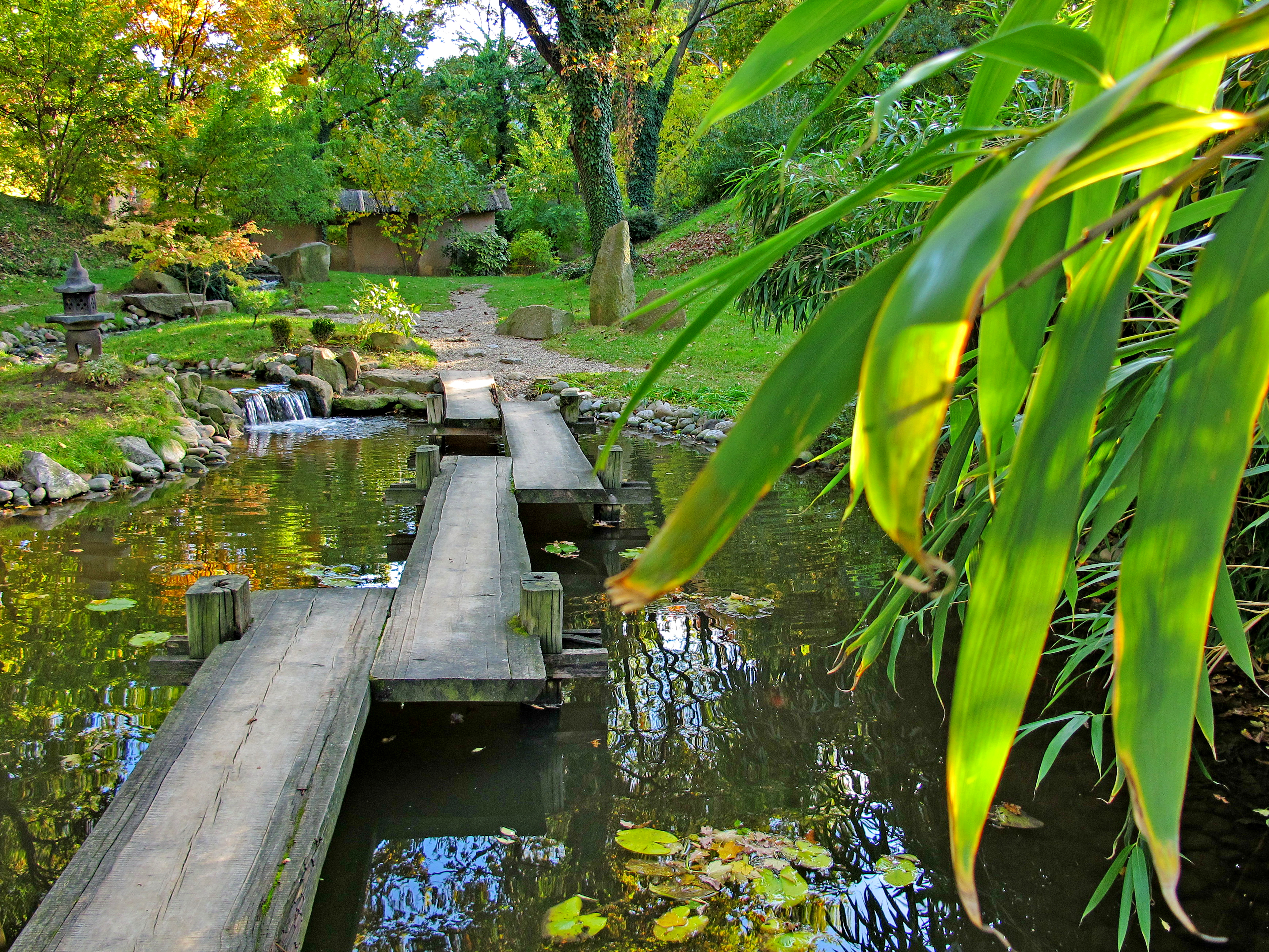 Ово је фотографија заштићеног природног добра у Србији под шифром: СП005This is a a photo of a natural area in Serbia with ID: СП005 Споменик природе Ботаничка башта Јевремовац